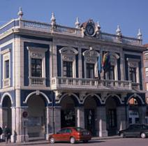 Ayuntamiento de Laviana, Asturias (España)